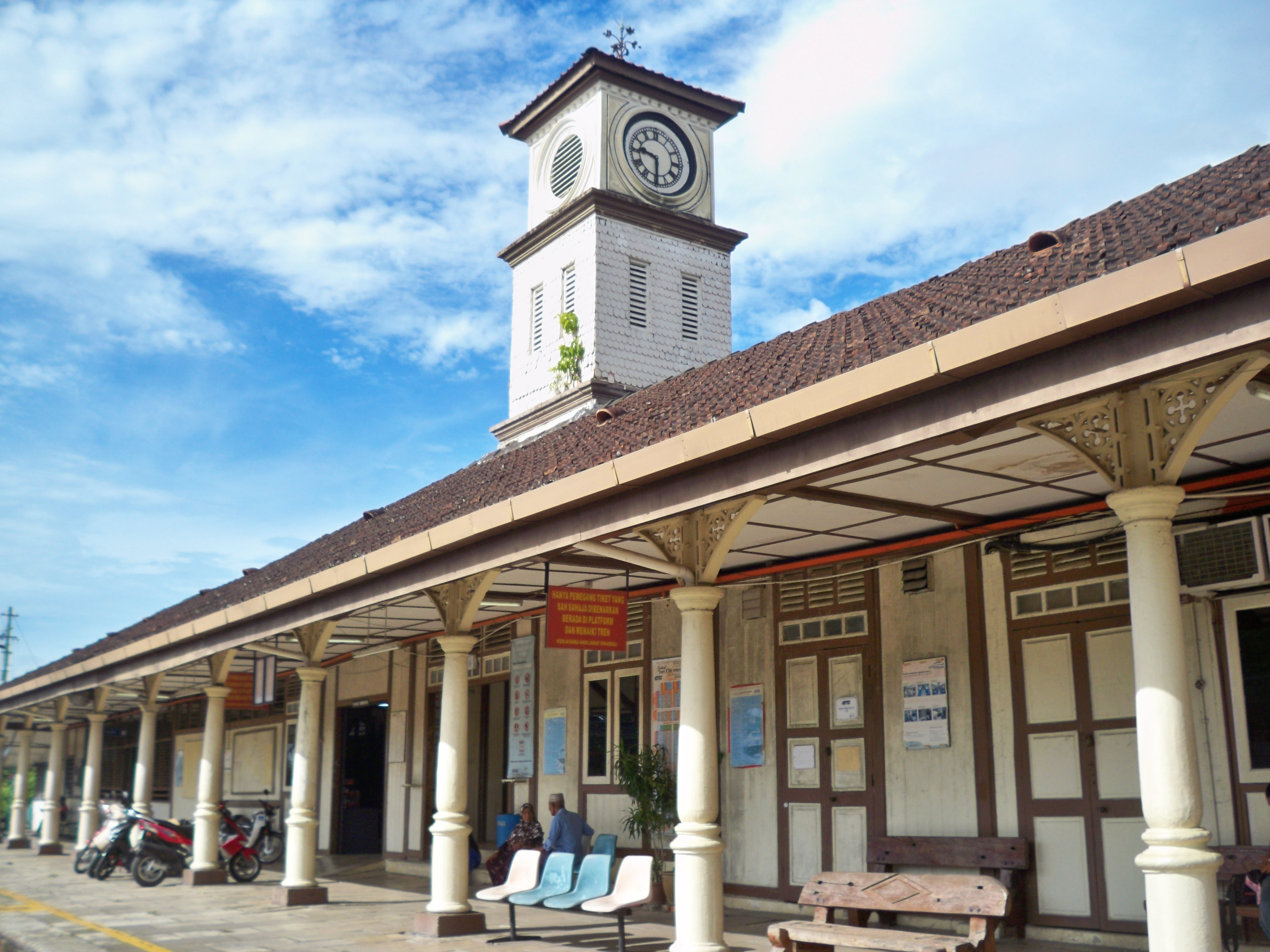 Вокзал в Алор-Сетар